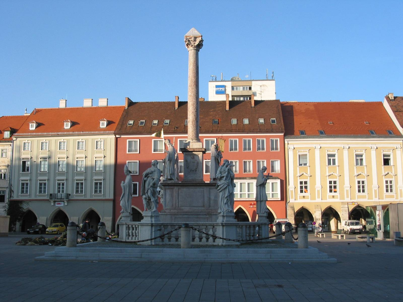 Hauptplatz, Wiener Neustadt, 2005-10-27 selfmade photo